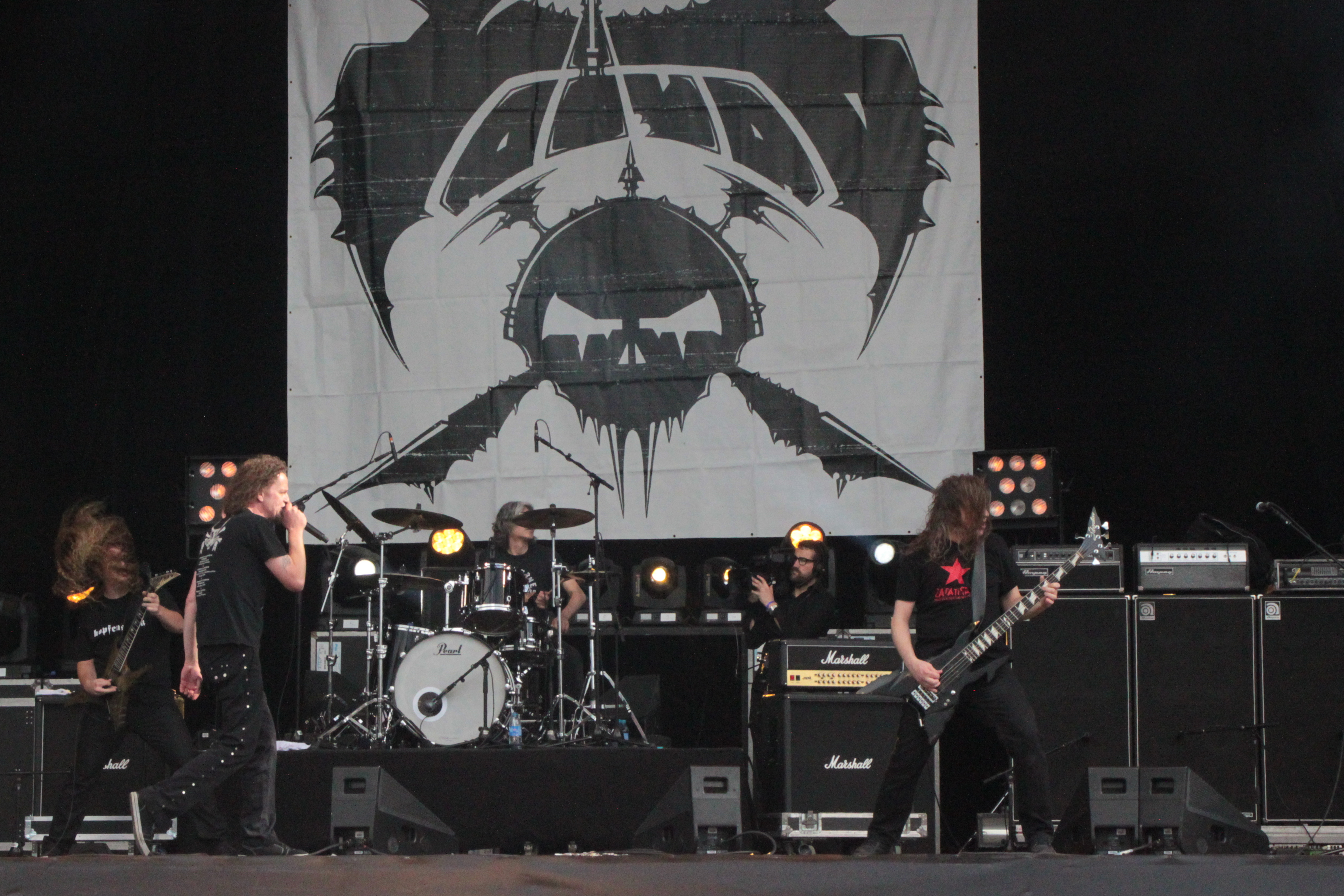 Voivod, Hellfest 2013, Fr-44-Clisson.